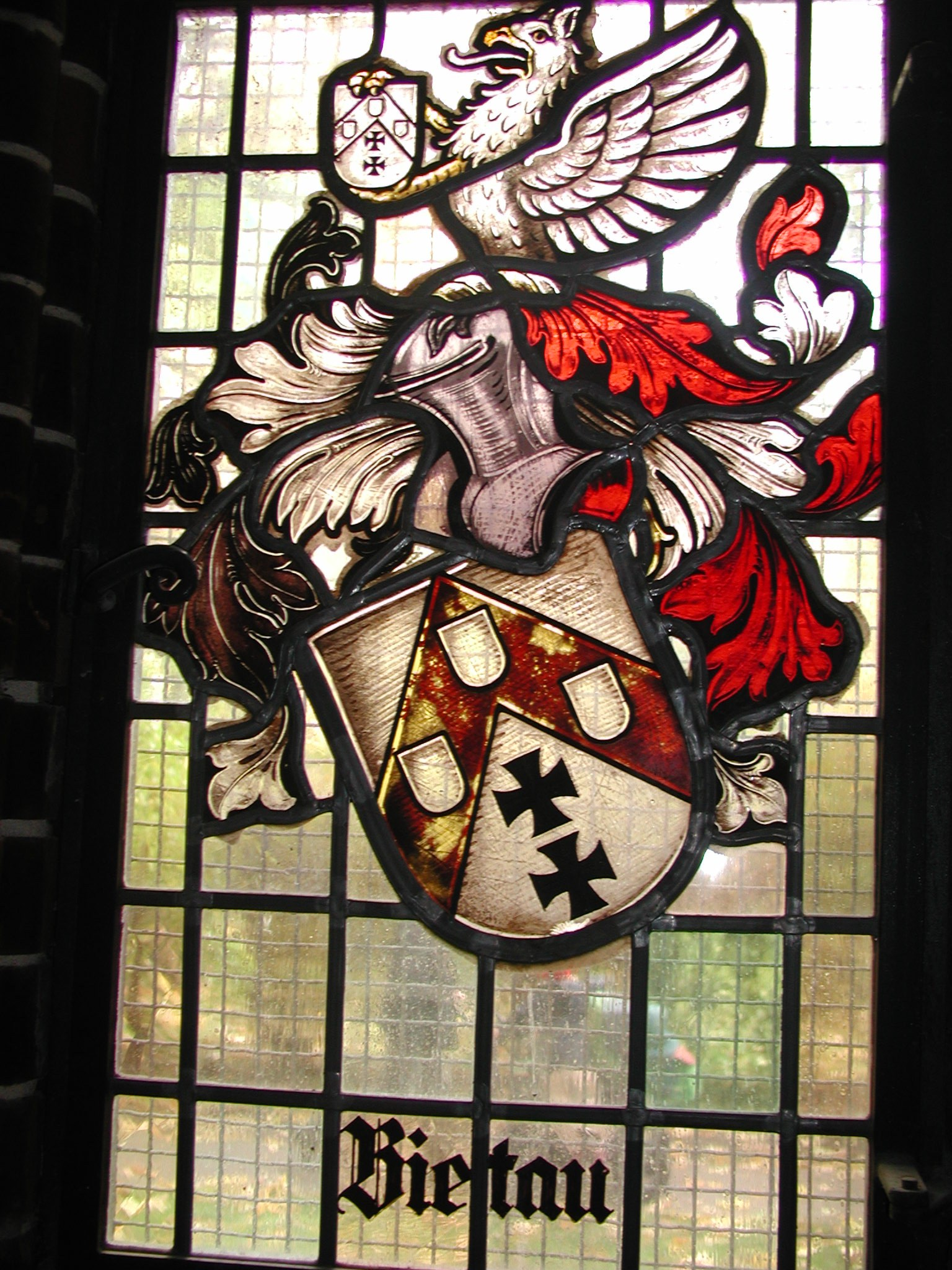 altes Glasfenster in der Erlöserkirche